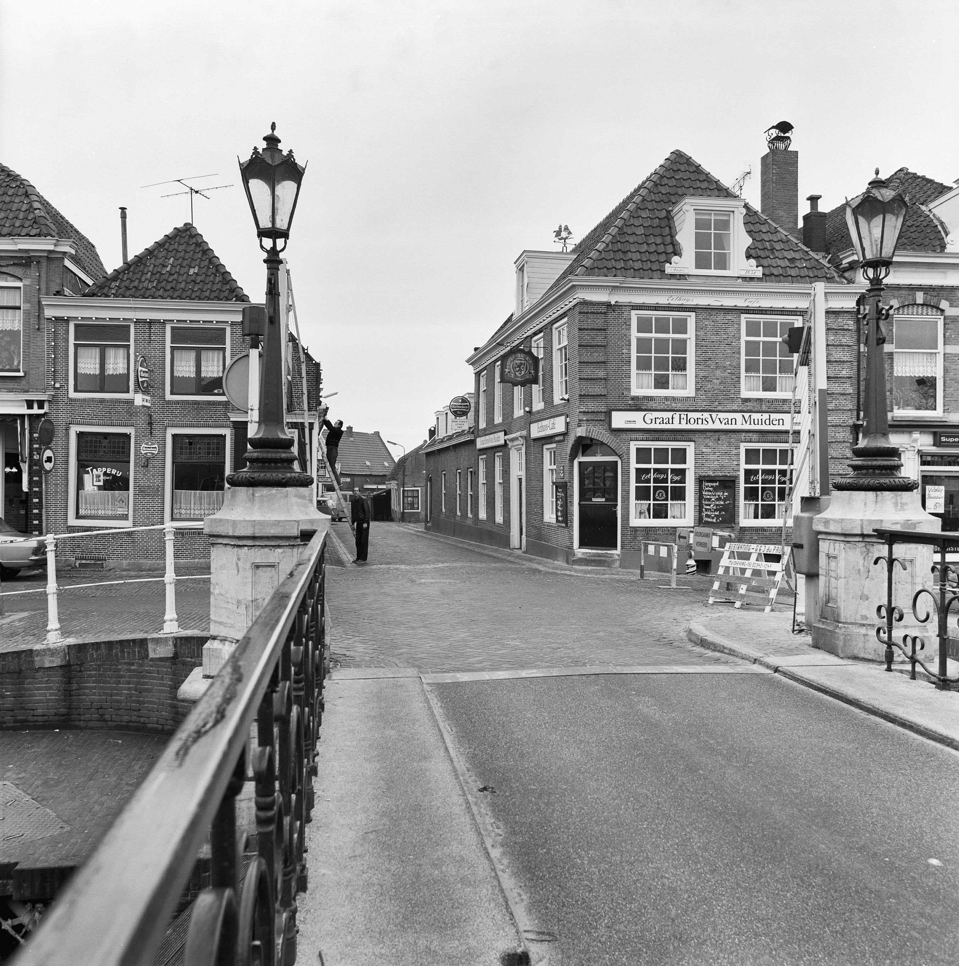 overzicht kruising Herengracht/Naarderstraat vanaf de brug